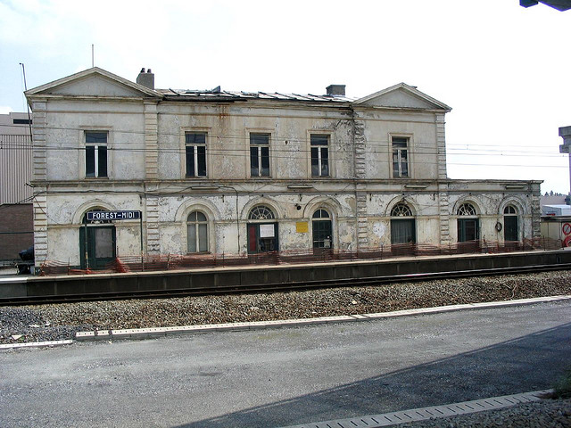 Ancien bâtiment voyageurs de la gare de Forest-Midi en 2004.